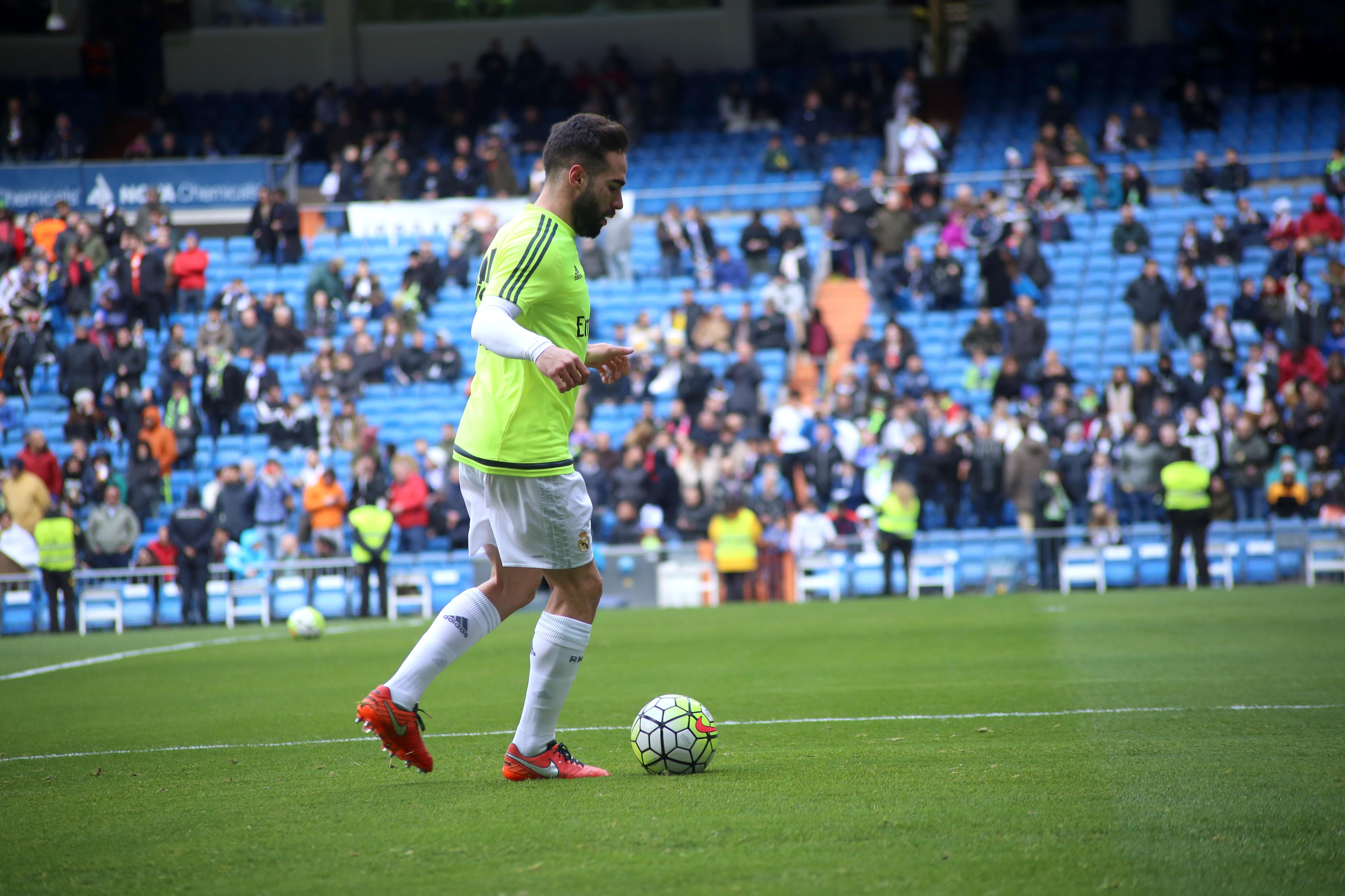 Dani Carvajal entrenando